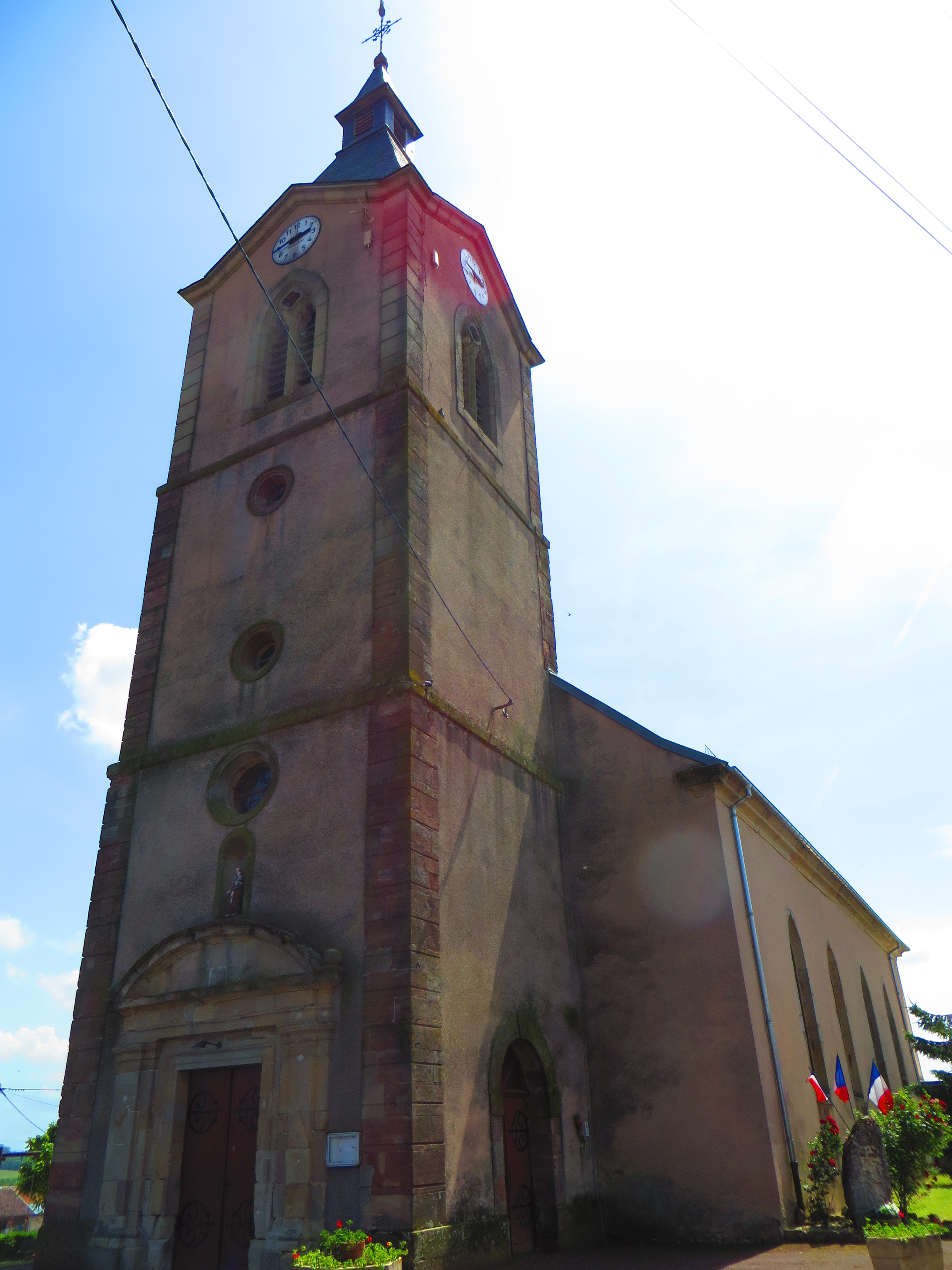 Foulcrey eglise